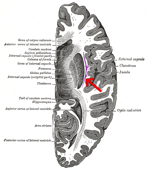 claustrum.